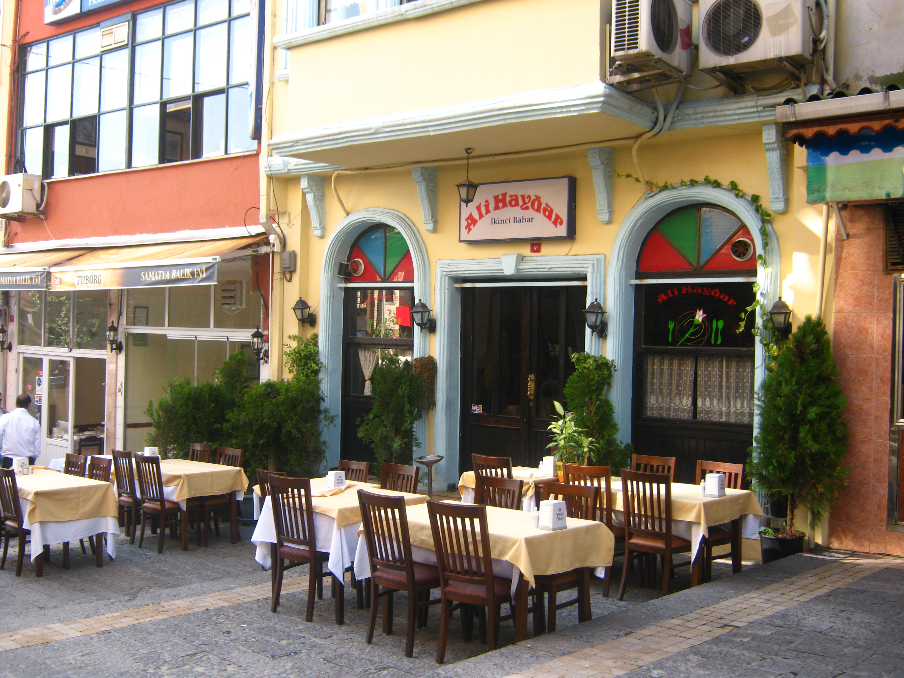 İkinci Bahar dizisi